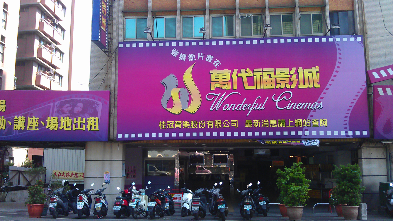 萬代福影城。